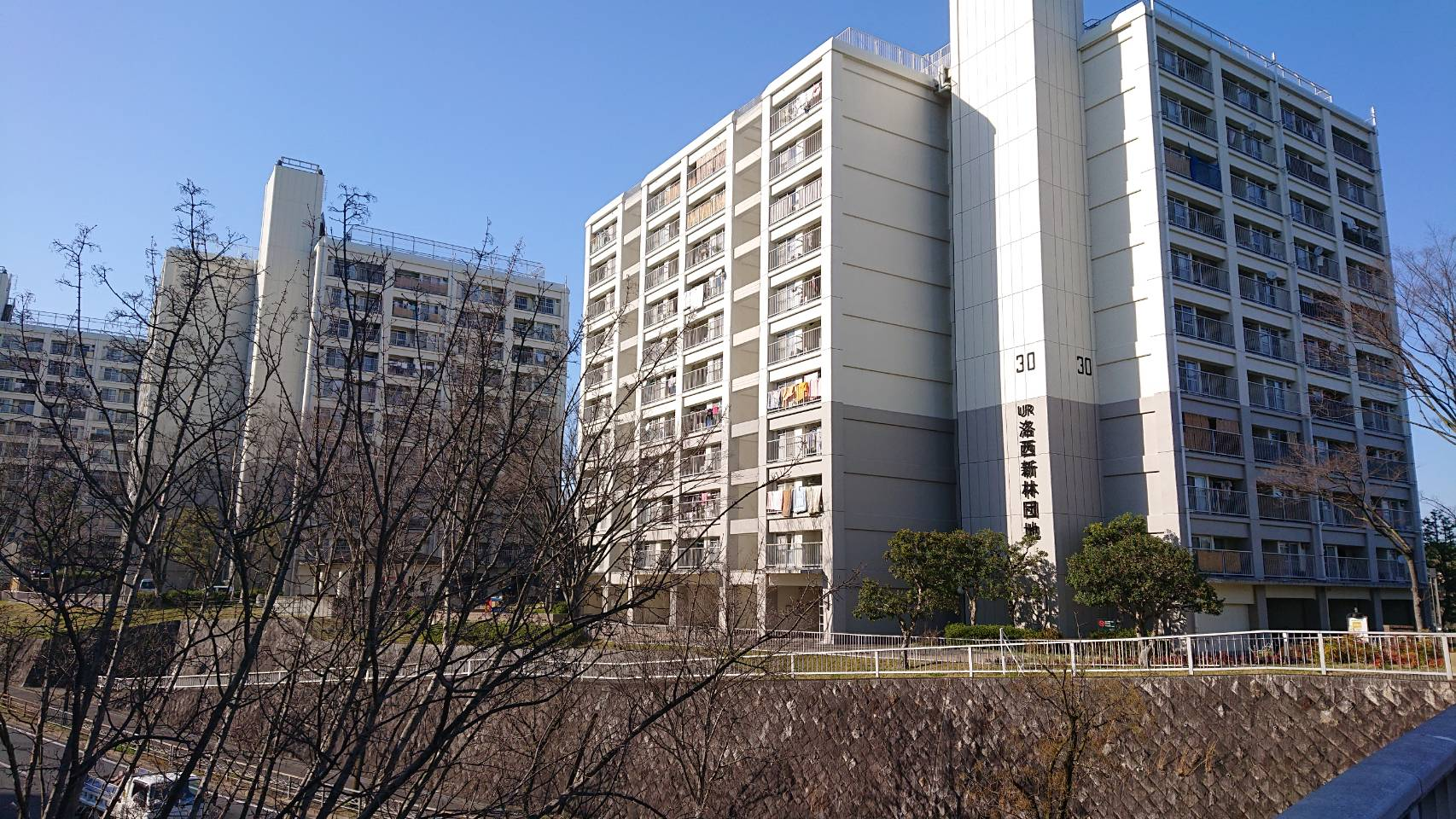 洛西ニュータウンの団地の建物を撮ったもの